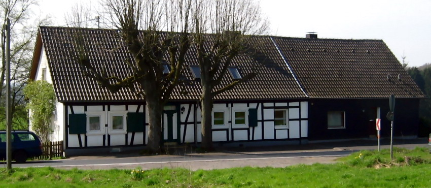 Ahlbusch - Ortsteil der Gemeinde Nümbrecht